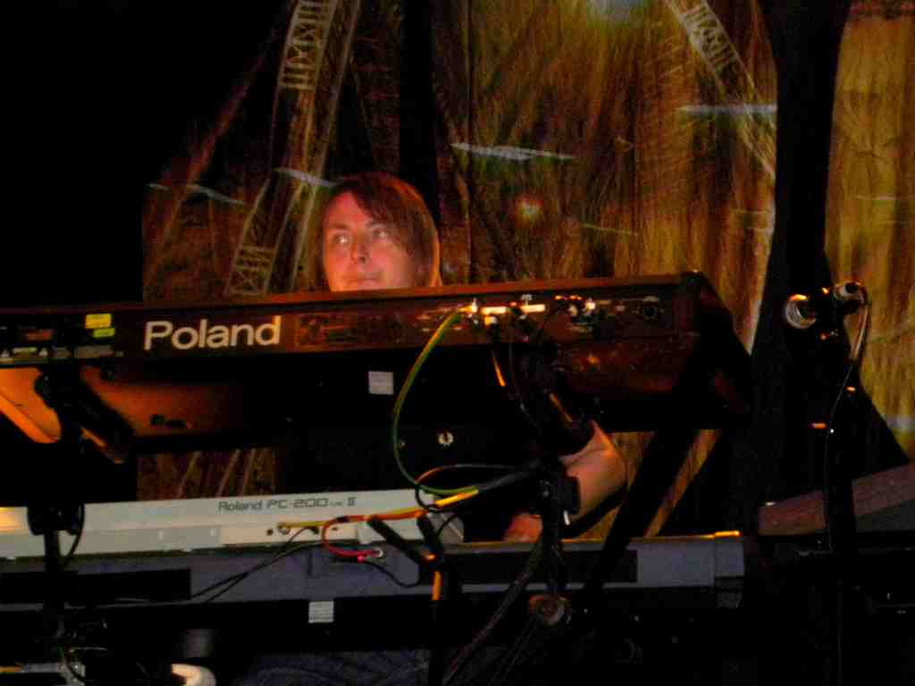 Martin Rebelski at a Doves gig.